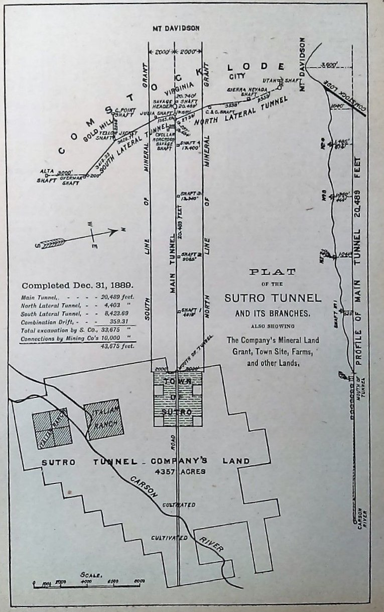 Plano del túnel Sutro, incluyendo planta, alzado y dimensiones